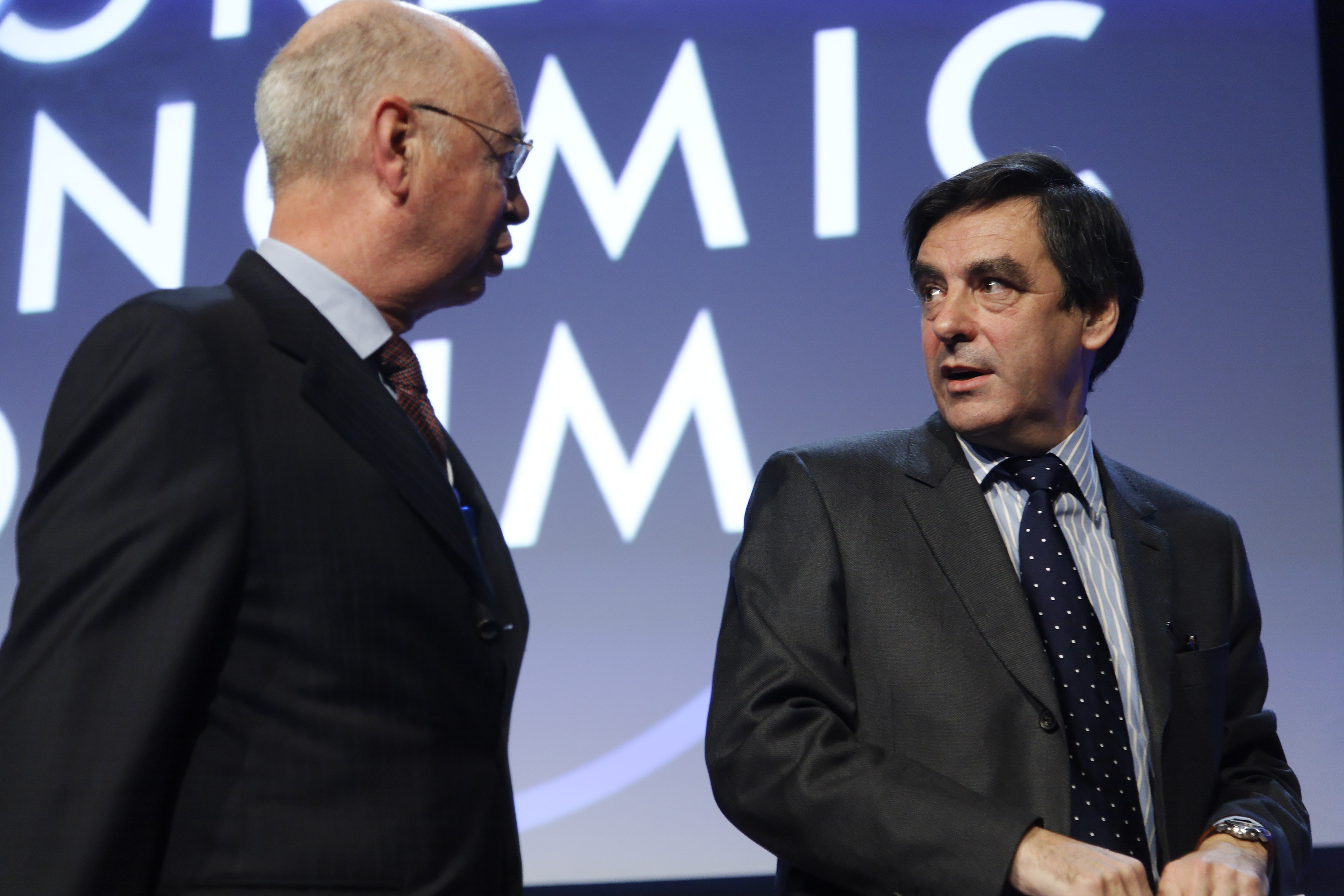 Klaus Schwab, fondateur et président du Forum économique mondial et François Fillon le Premier ministre de la République française, 2008.